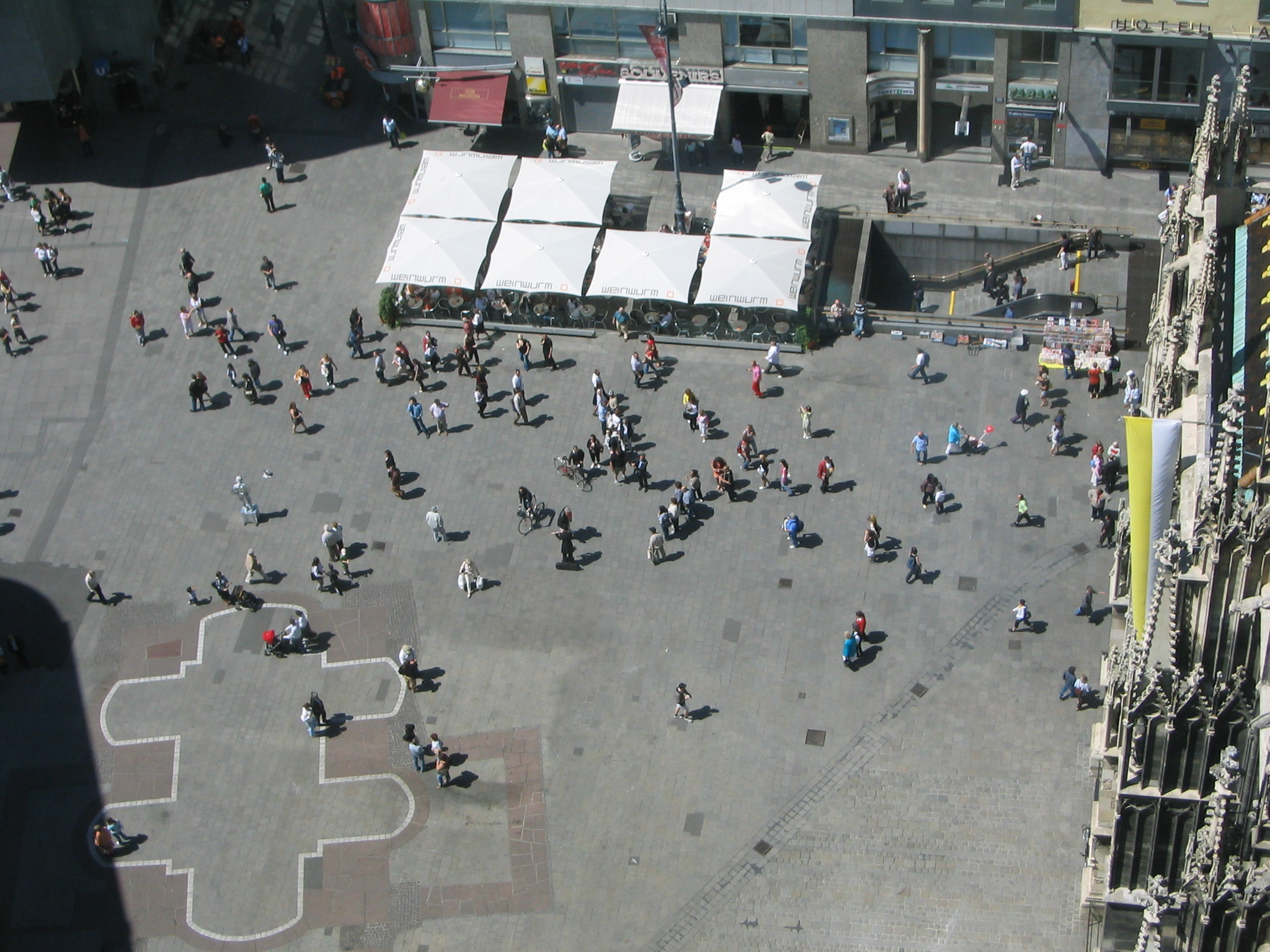 Stephansplatz mit den Umrissen der ehemaligen Magdalenenkapelle; vor der Neuverlegung des Pflasters 2017. Seit damals sind die Umrisse nur durch schmale schwarze Linien im Pflaster erkennbar.